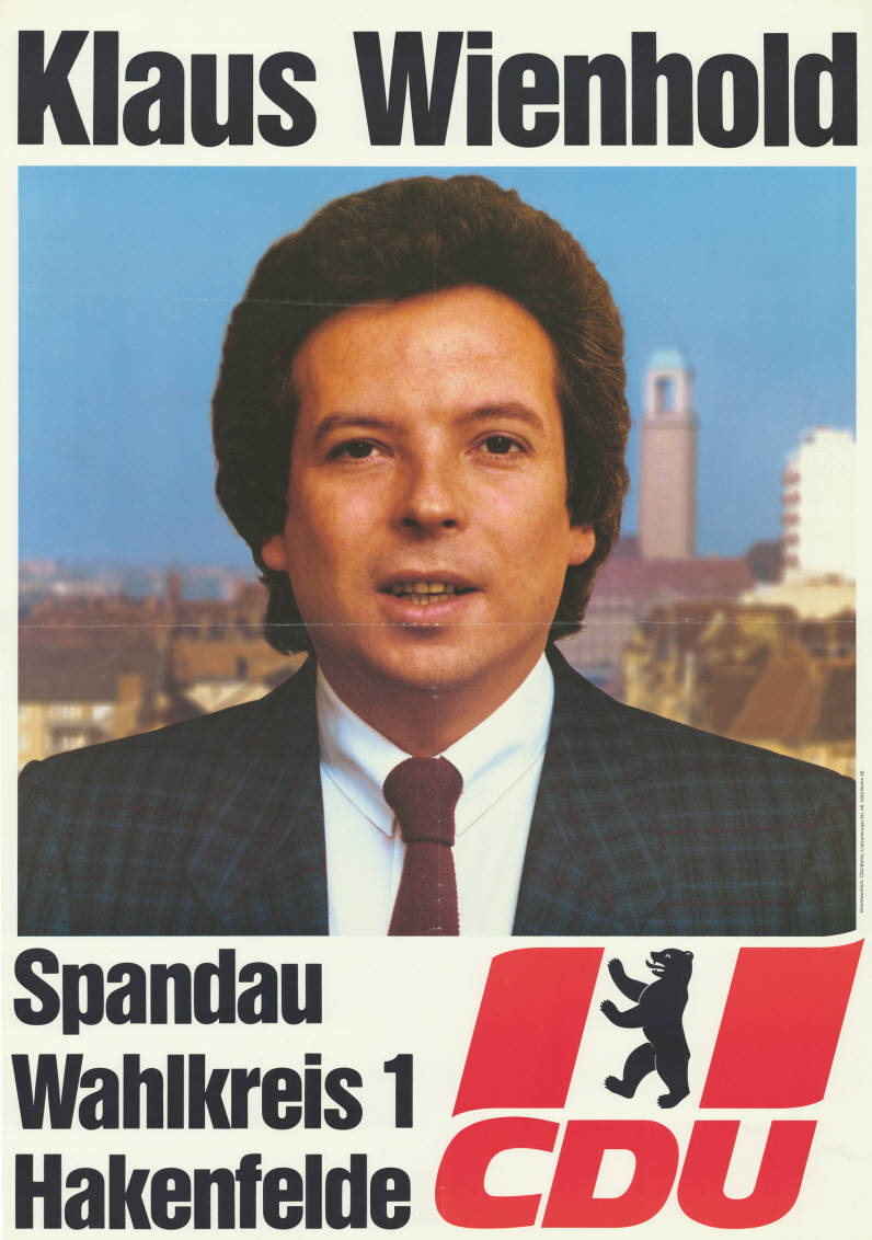 Klaus Wienhold Spandau ... CDU Abbildung: Porträtfoto vor typischem Spandauer Stadthintergrund - Berliner Bär Plakatart: Kandidaten-/Personenplakat mit Porträt Auftraggeber: Verantw.: CDU Berlin Objekt-Signatur: 10-004 : 679 Bestand: Plakate zu Abgeordnetenhauswahlen Berlin (10-004) GliederungBestand10-18: Plakate zu Abgeordnetenhauswahlen Berlin (10-004) » CDU Lizenz: KAS/ACDP 10-004 : 679 CC-BY-SA 3.0 DE